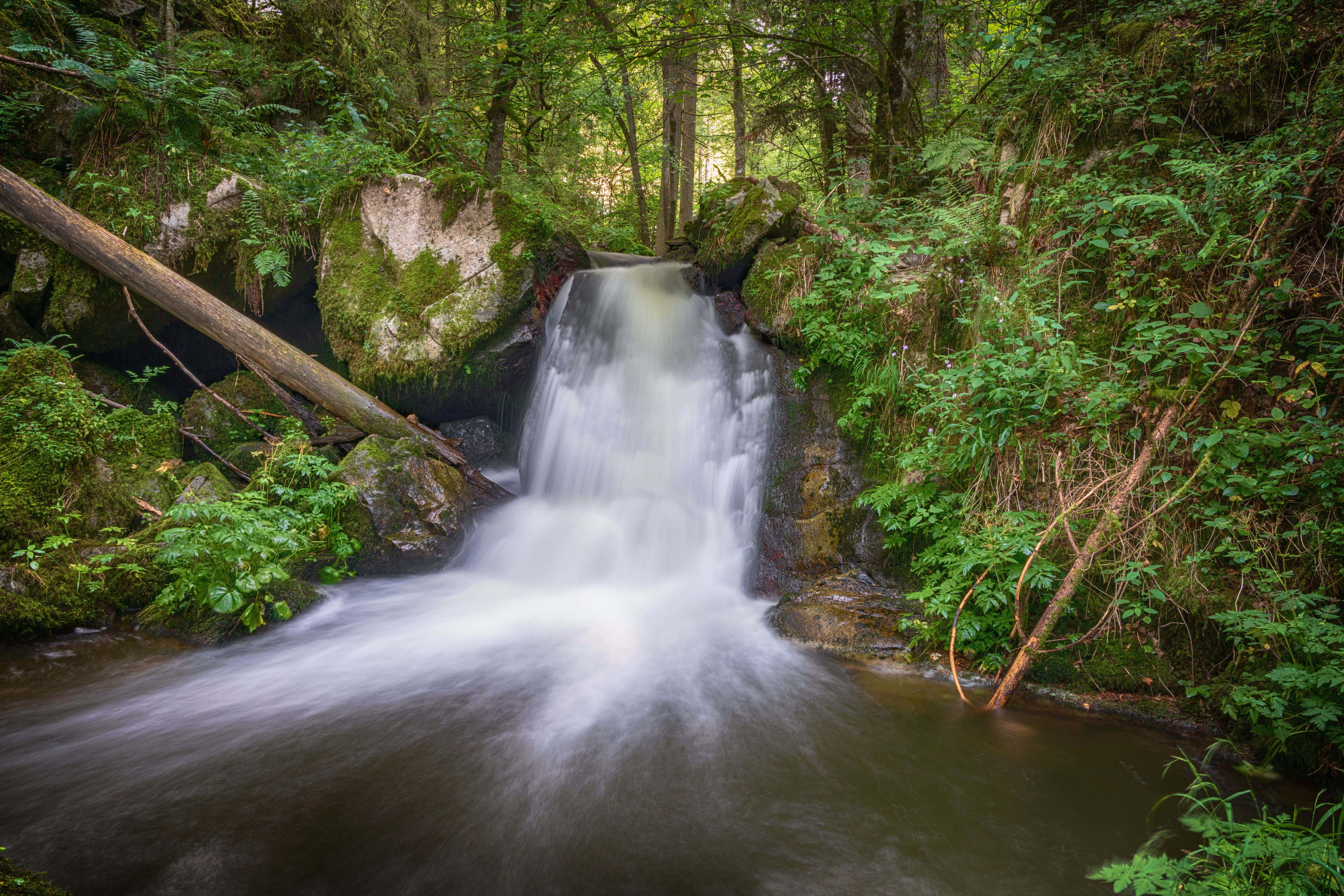 Wasserfall der Metttma